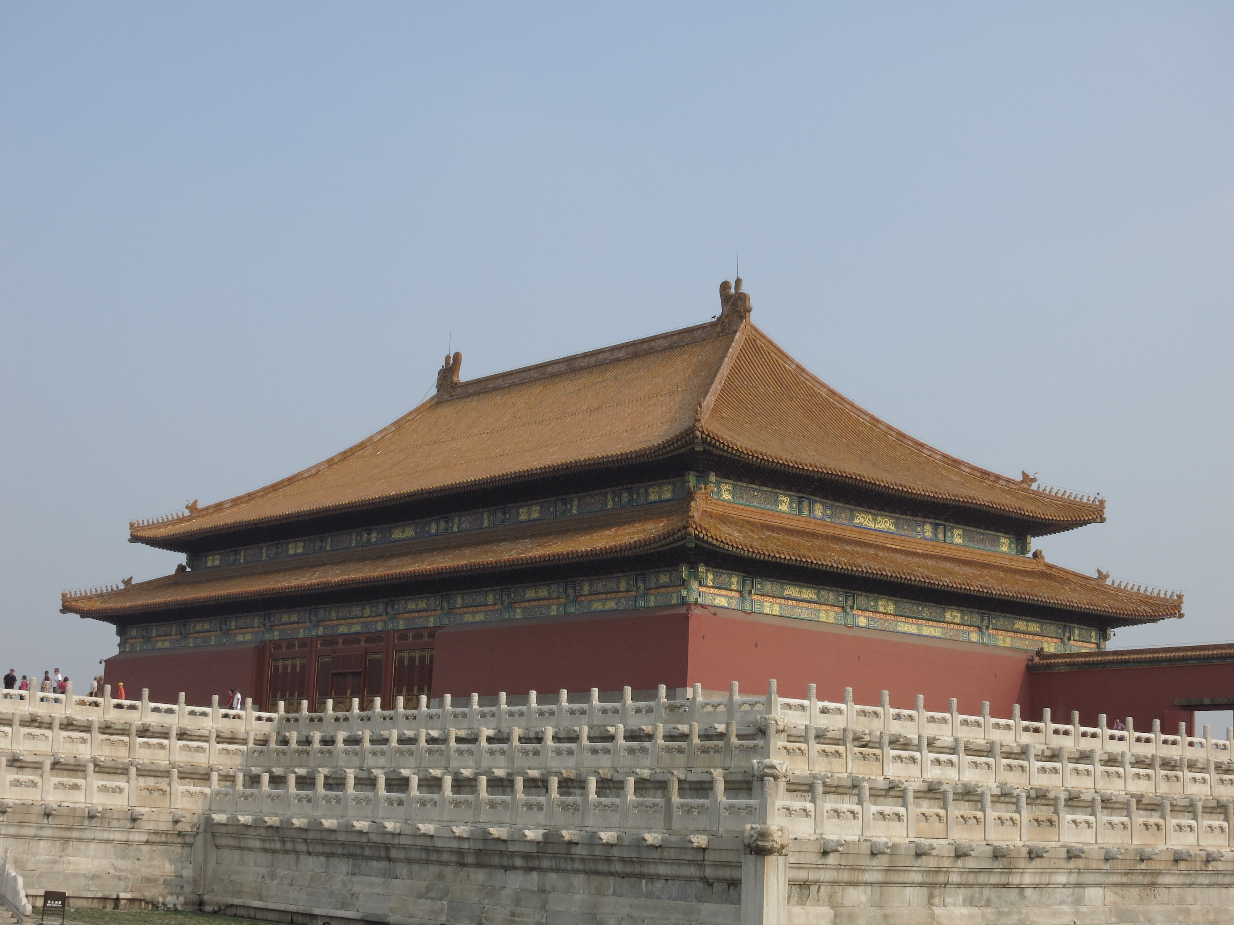 從太和殿西北方向看太和殿